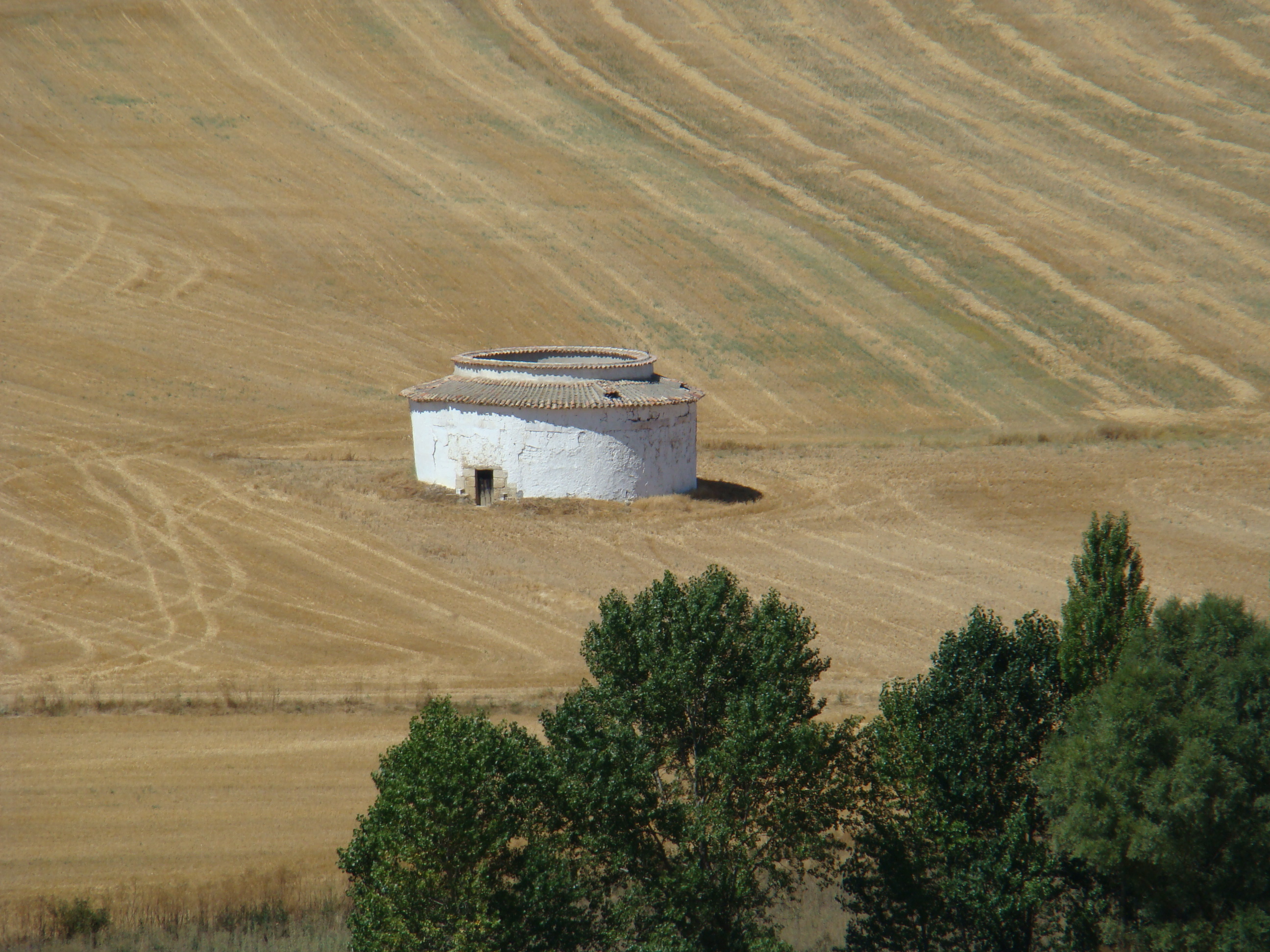 Montealegre de Campos en la provincia de Valladolid (España). Paisaje con un palomar.